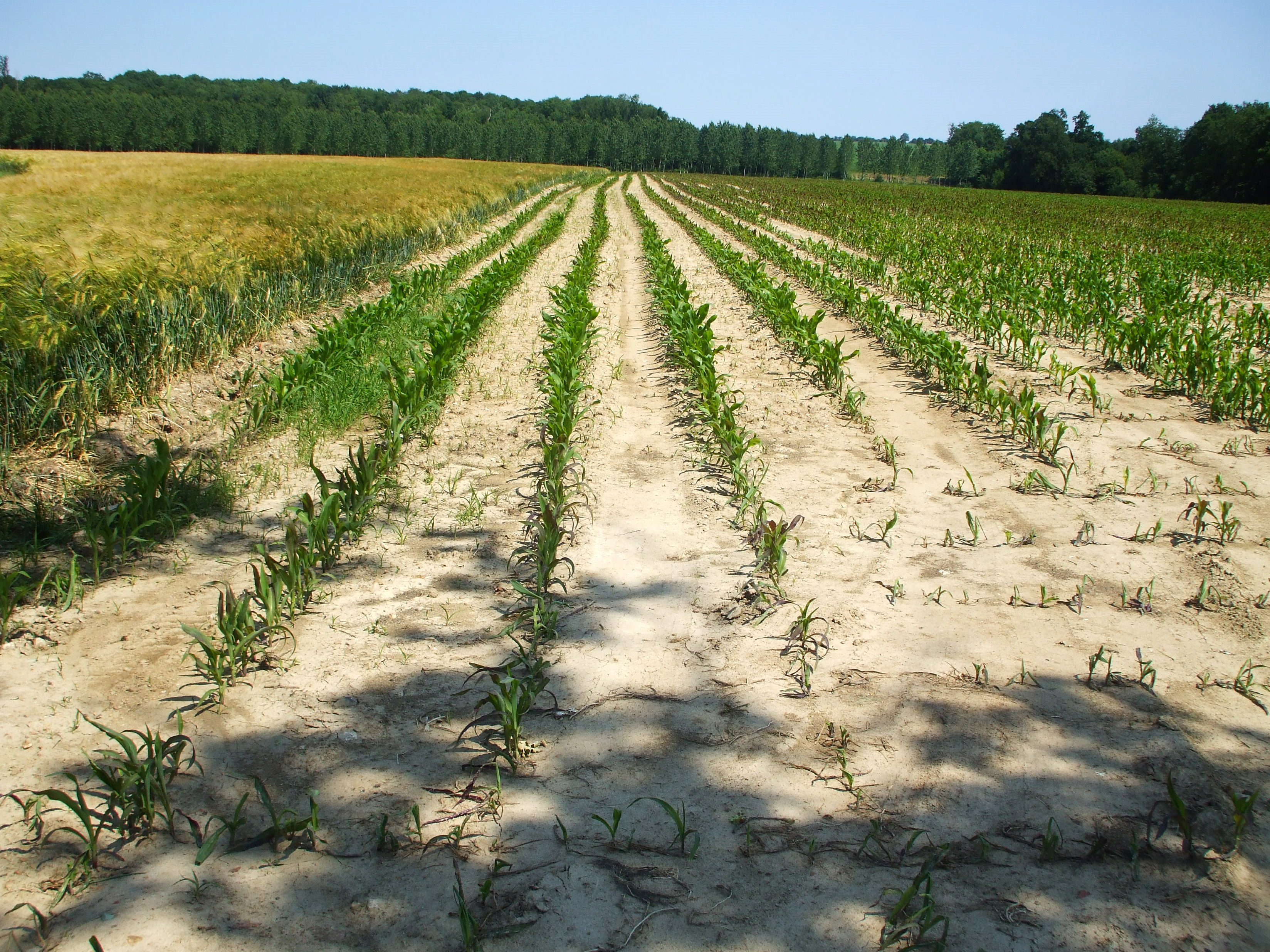 Haute-Marne, France. Champ de maïs affecté par la sécheresse.